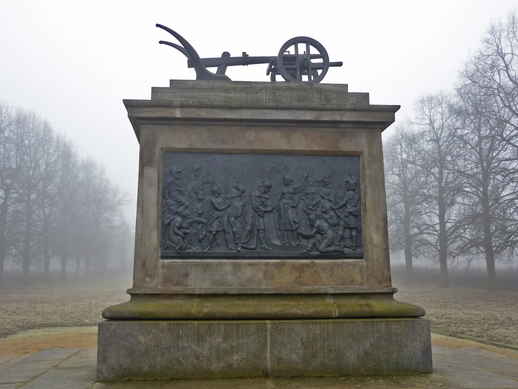 Denkmal Přemysl der Pflüger in Stadice